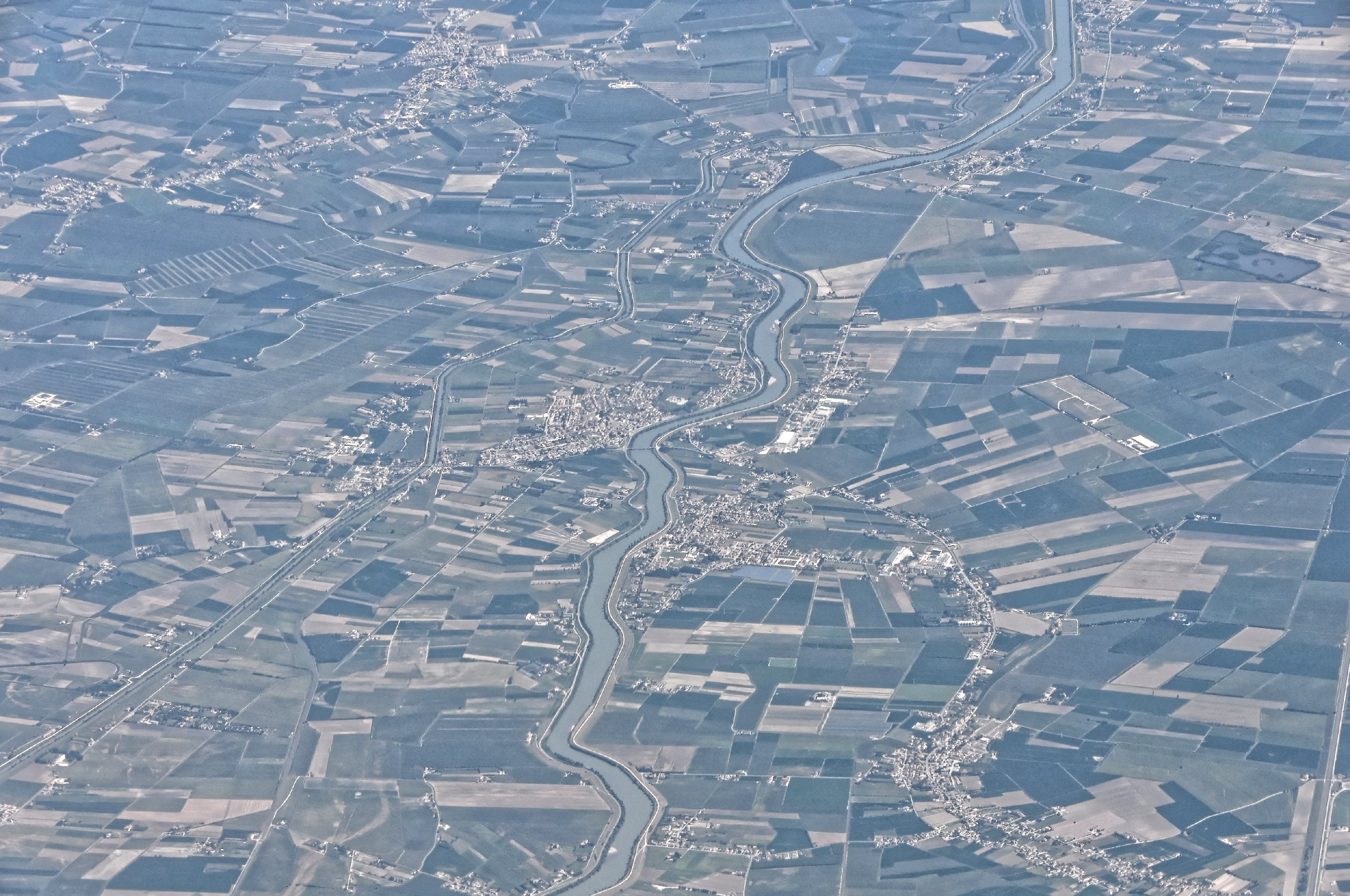 Bilder vom Flug -Rom-Düsseldorf-Hamburg 2013 Dieses Foto entstand in Zusammenarbeit mit Stadtbesichtigungen.de Die Seiten Stadtbesichtigungen.de, der dazugehörige Reise Blog sowie die Facebookseite: Stadtbesichtigungen Rom dürfen dieses Bild für Ihre Veröffentlichungen ohne den Hinweis auf Wikipedia, Commons bzw der Lizenz verwenden. Die Verantwortlichen habe von mir (Ra Boe) die Originaldaten zur freien Verfügung übermittelt bekommen.